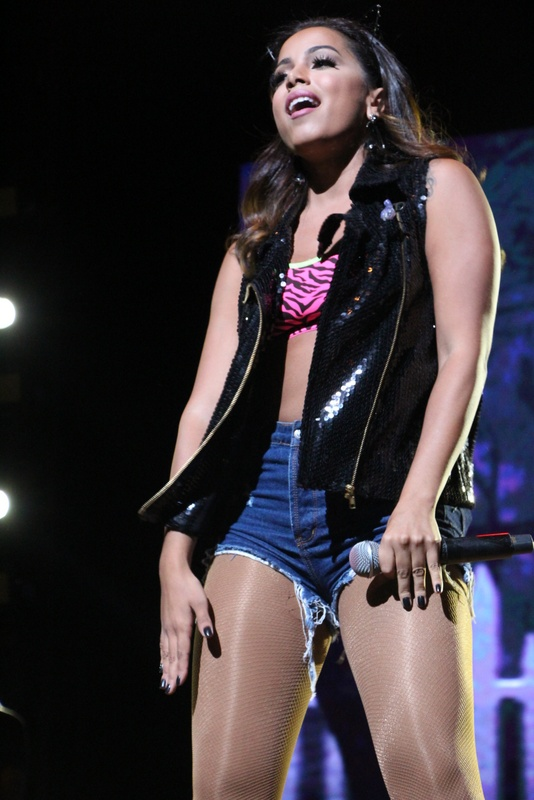 32 - Anitta (32)